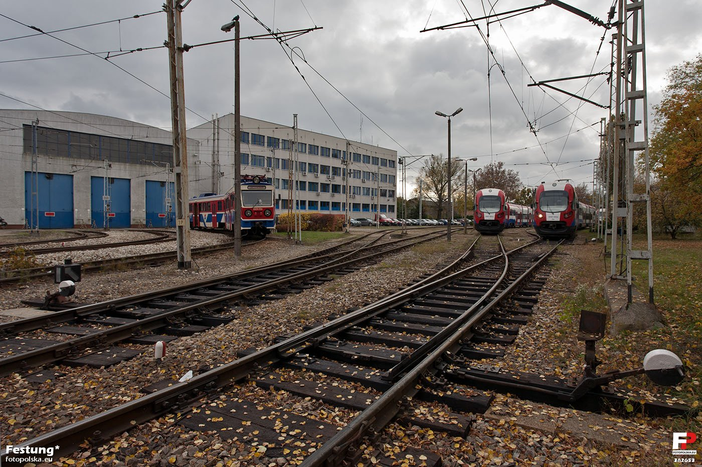 Zaplecze techniczne WKD. Widzimy tabor różnej generacji.